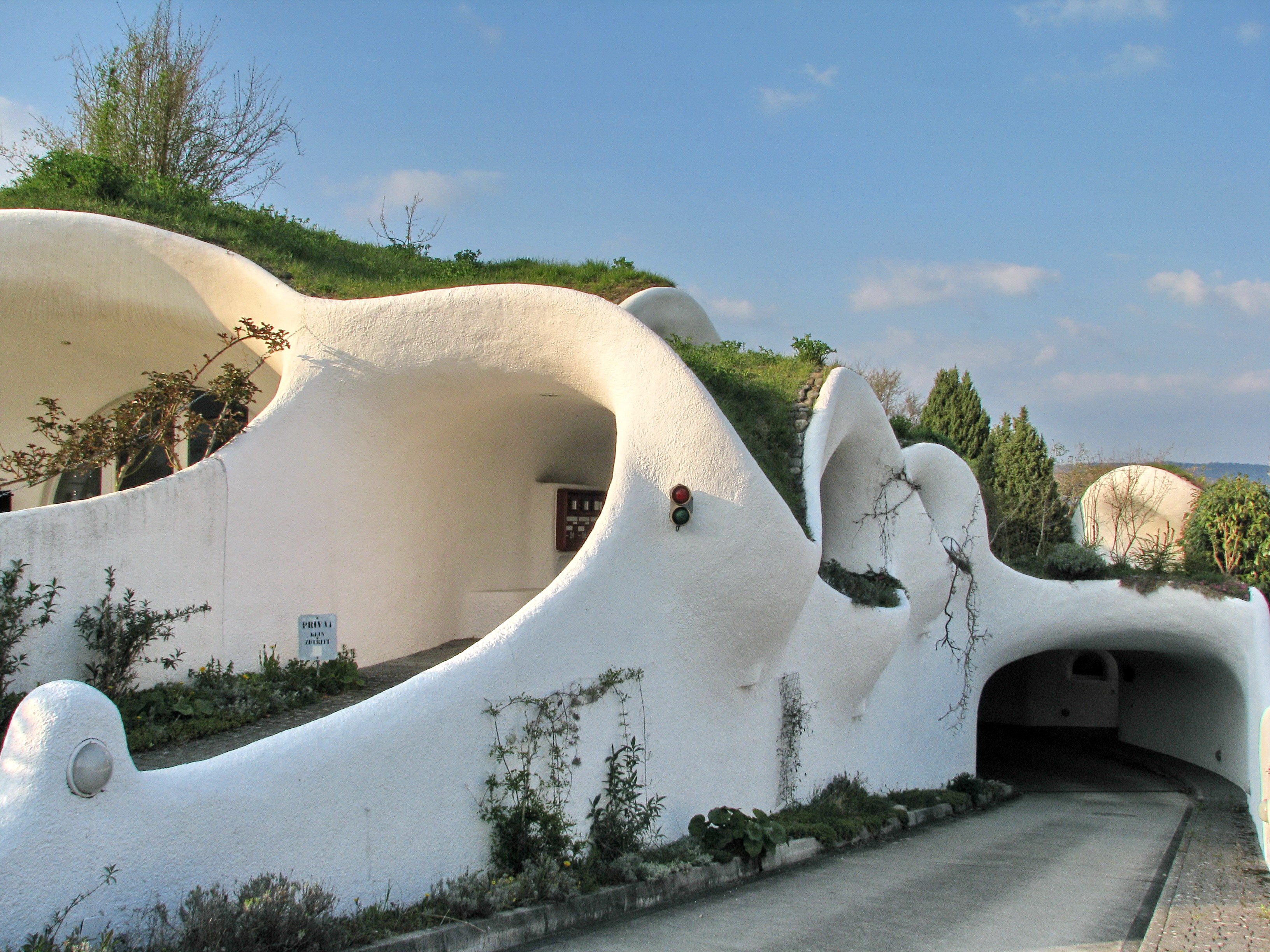 Earth house estate Lättenstrasse in Dietikon (Switzerland) by Peter Vetsch